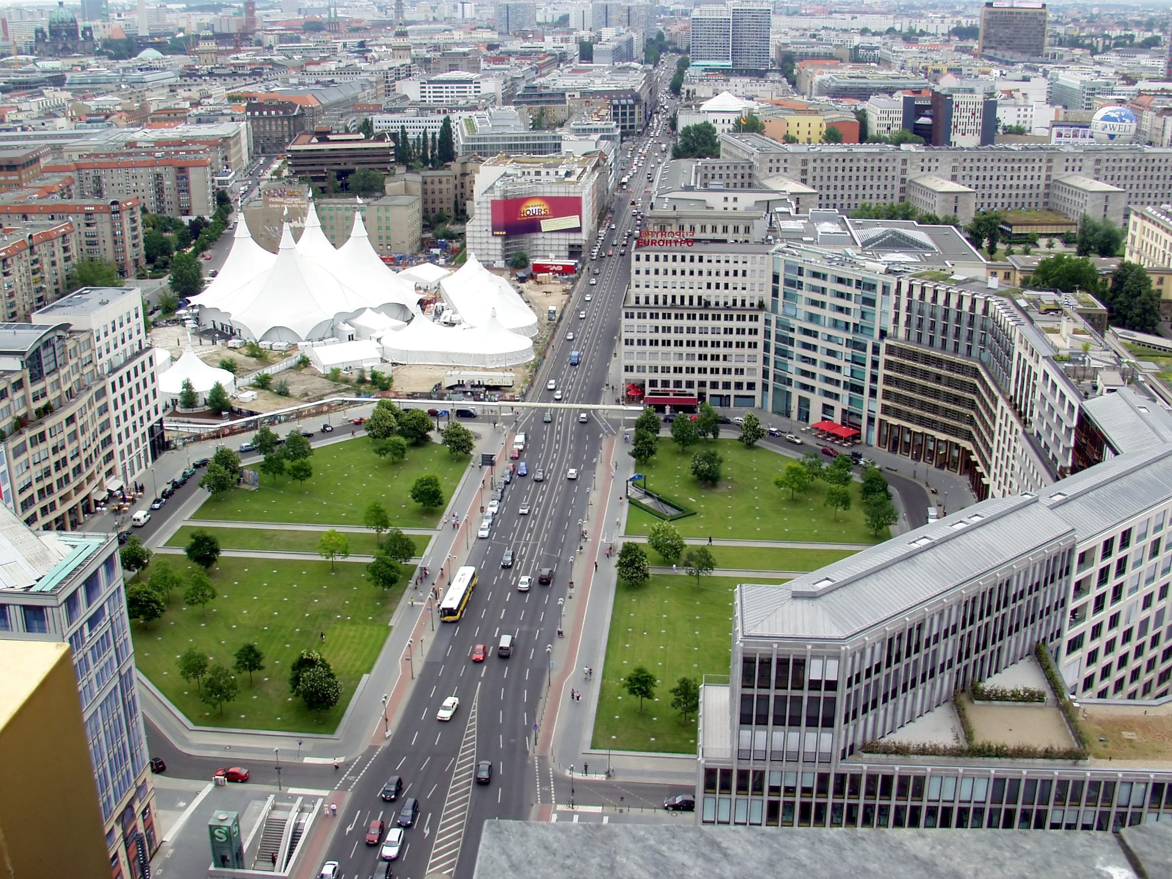 Leipziger Platz, Berlin. Aufnahmestandort: Aussichtsplattform auf dem Kollhoff-Tower.